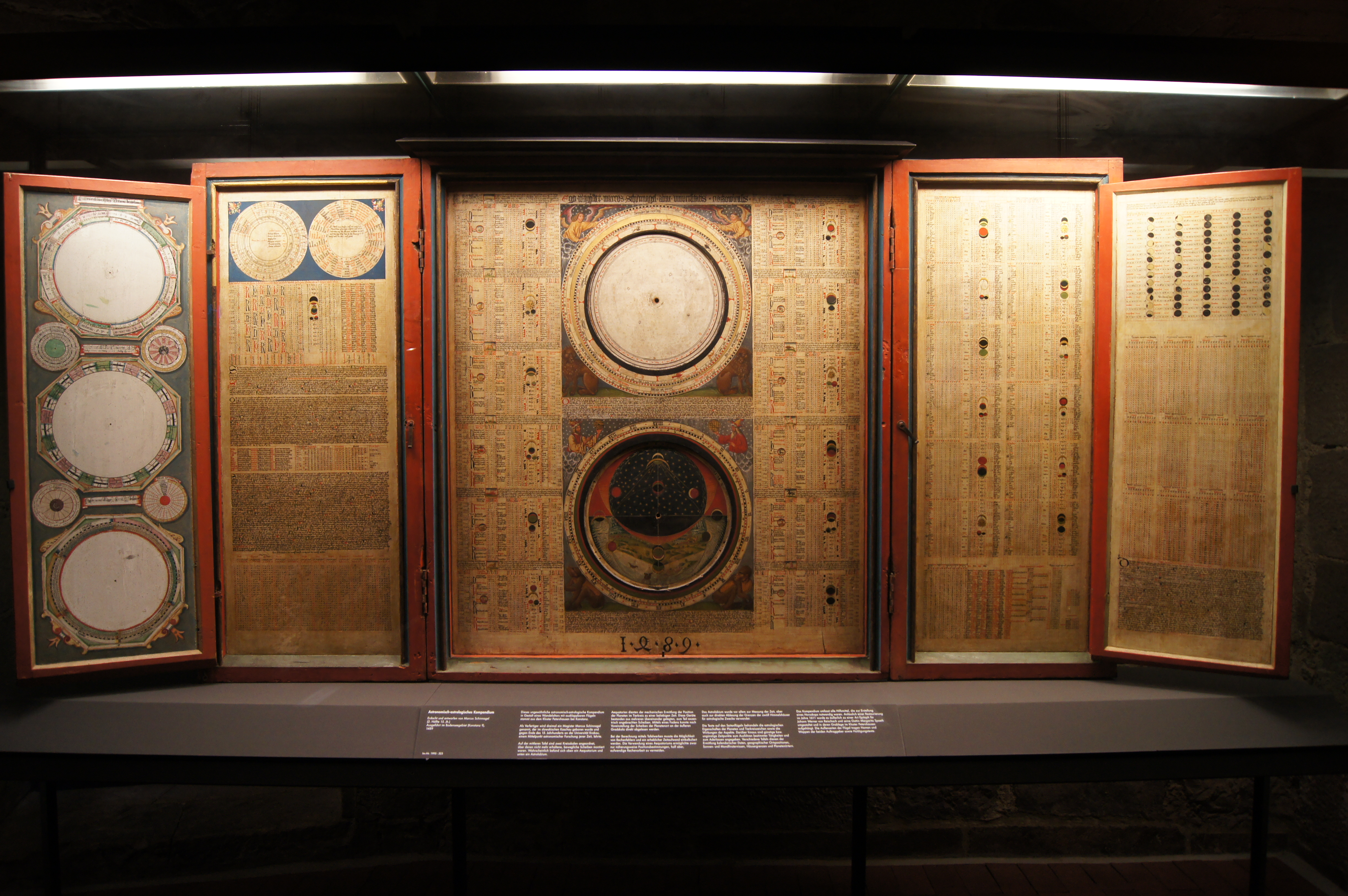 Astronomisch-astrologisches Kompendium, Entworfen von Marcus Schinnagel, 2. Hälfte 15. Jh., Ausgeführt 1489 im Bodenseegebiet; Landesmuseum Baden-Württemberg, Stuttgart